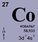 Кобальт